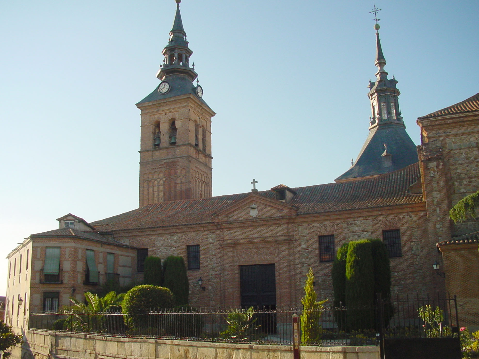 Vista Iglesia de Nuestra Señora de la Asunción de Navalcarnero.